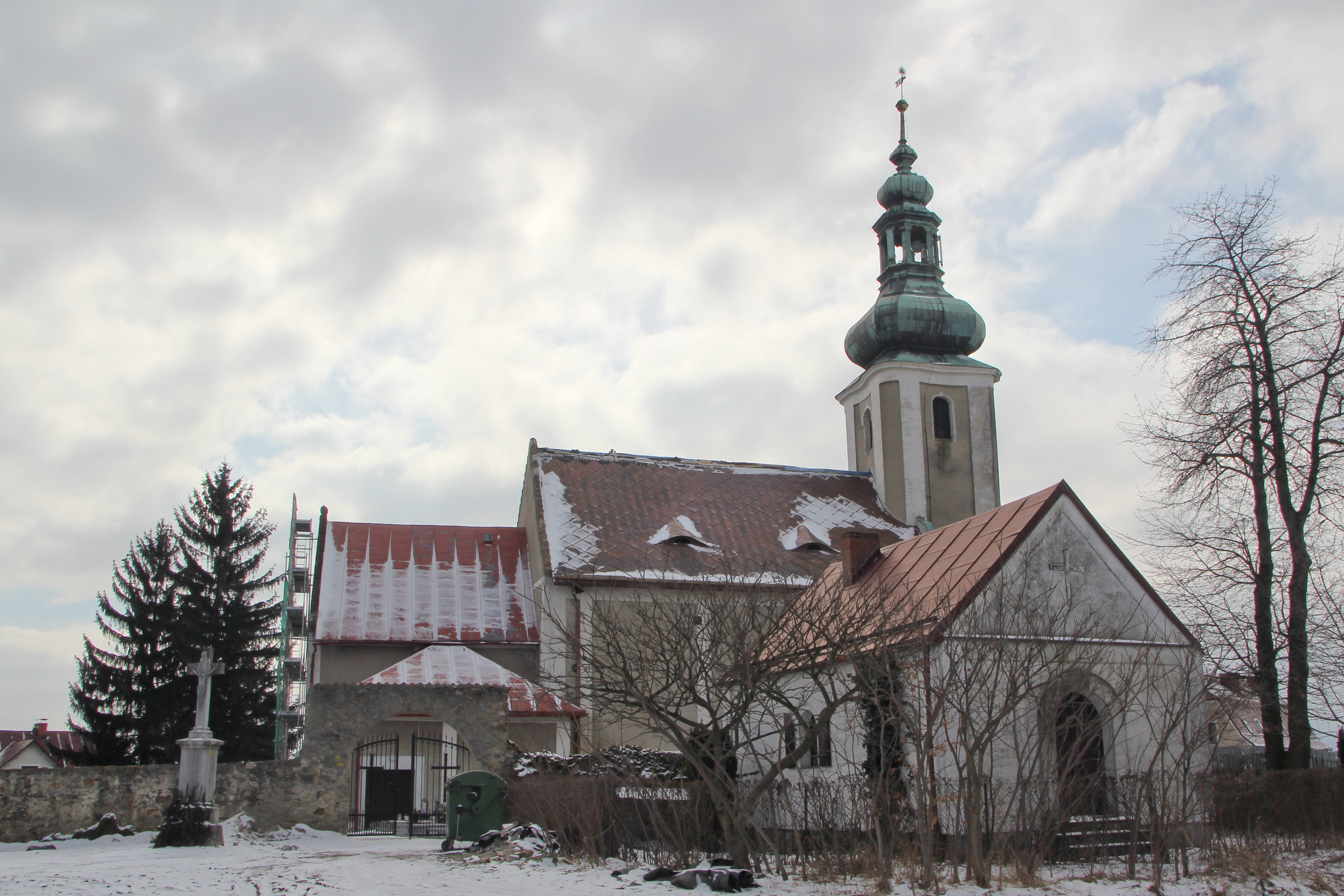 Biskupów – rzymskokatolicki kościół parafialny p.w. Zwiastowania NMP, 1 poł. XIV, XVIII.